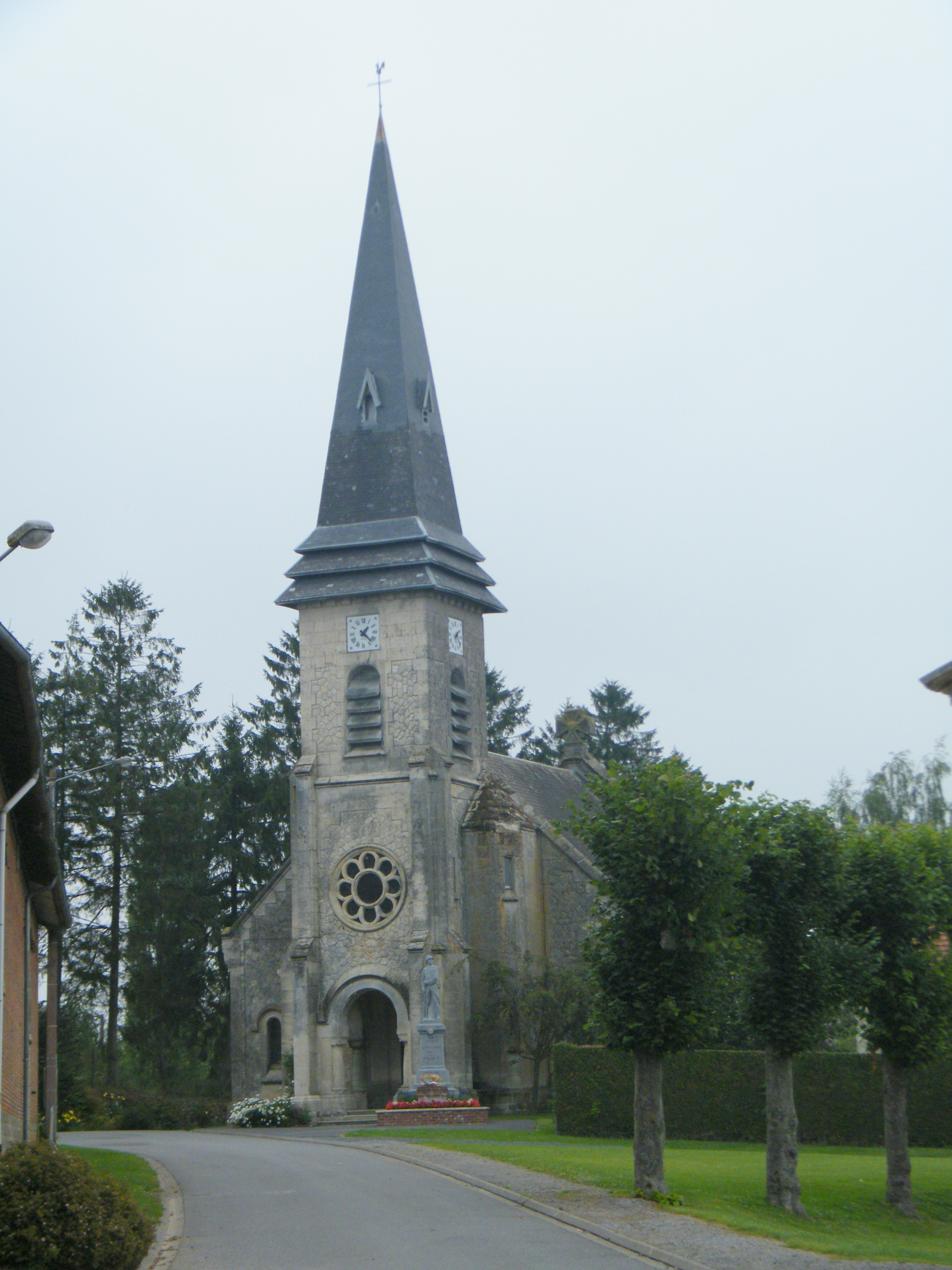 Eglise.